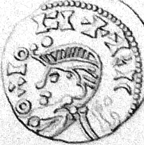 Halb-Pfennig von Magnus III Berrføtt, 1093-1103 König von Norwegen. Kein sinnvoler Text. 0,399 g. Feinghalt 875 ‰.